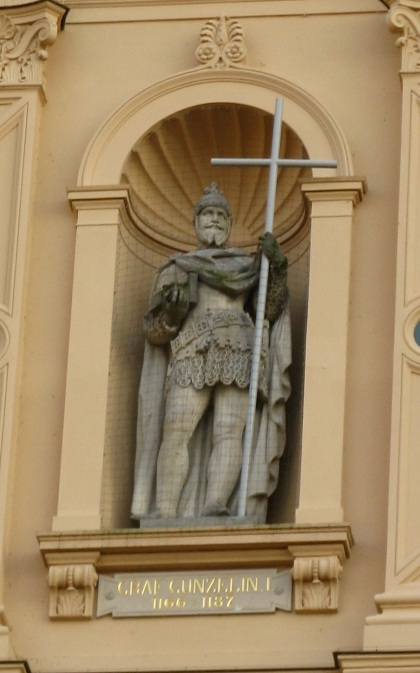 Statue Graf Gunzelins I. in der Fassade des Schweriner Schlosses von Gustav Willgohs, um 1855